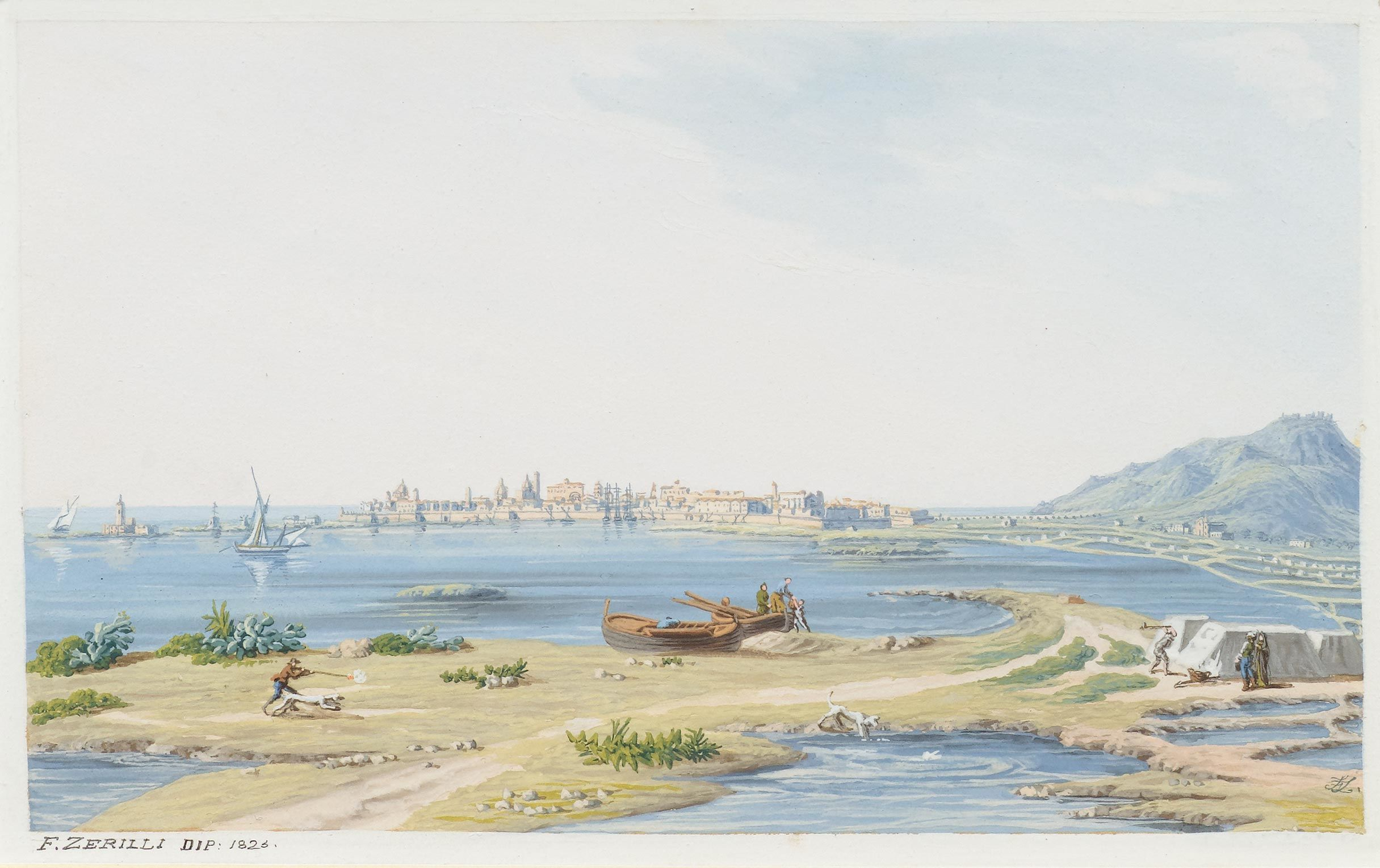 Blick auf Trapani mit dem Monte Erice im Hintergrund. Am unteren Rand rechts monogrammiert (ligiert): FZ. Unterhalb der Dartellung links mit schwarzer Feder signiert und datiert: F.Zerilli dip. 1826. Gouache, weiss gehöht. 10 x 16 cm